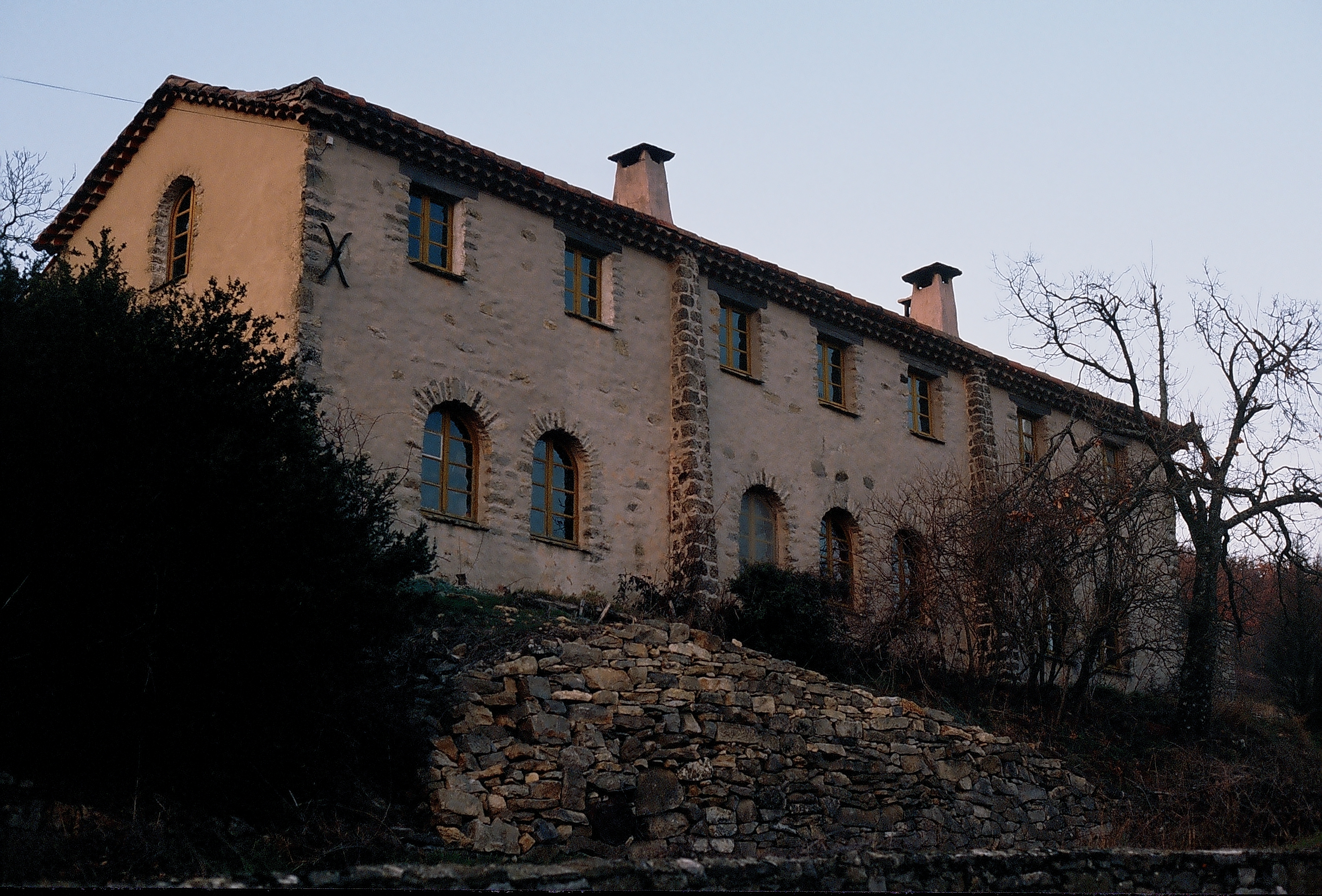 Nogaret, Roqueredonde, Hérault (Haut-Languedoc), France.